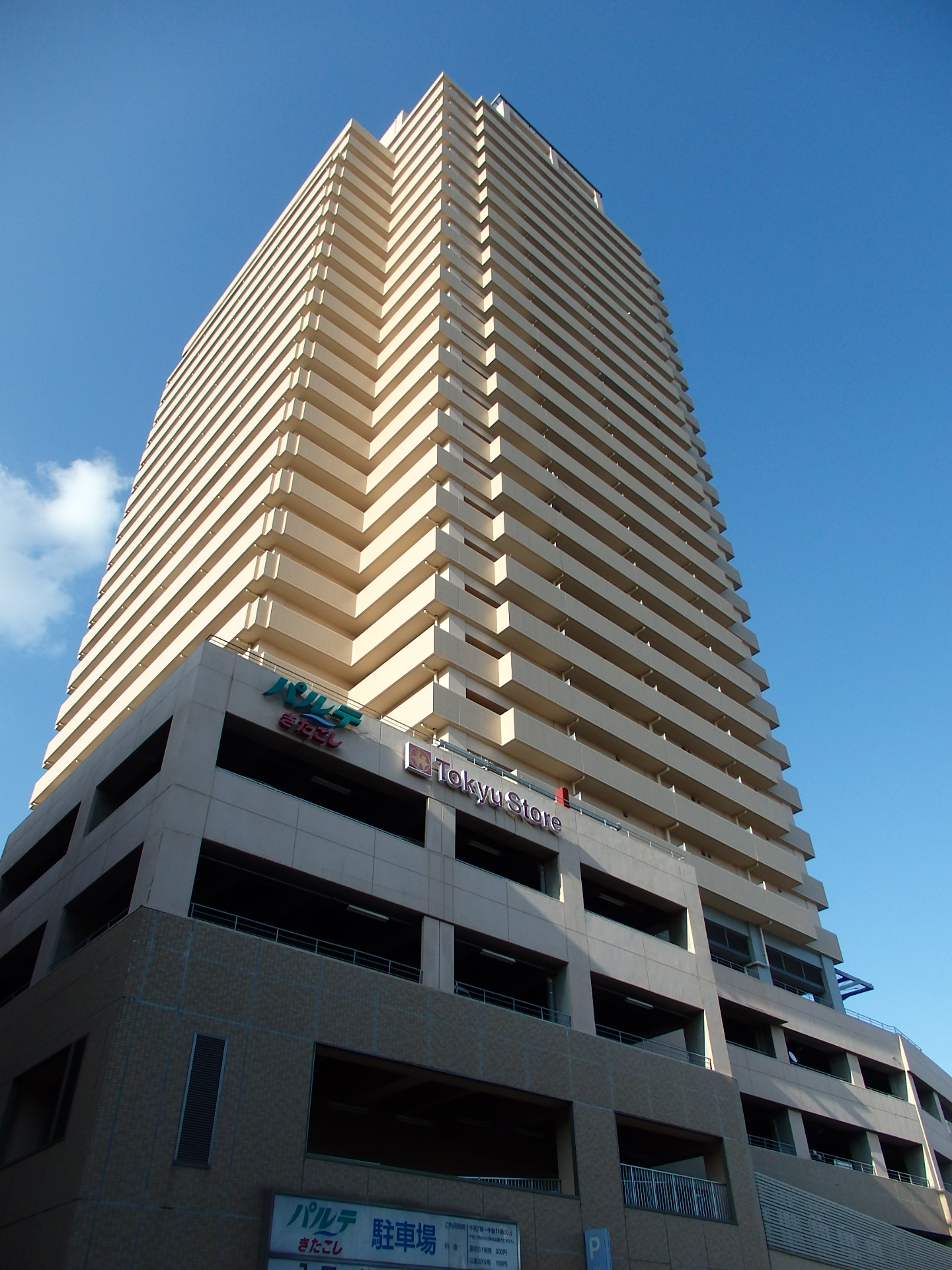 ライオンズステーションタワー北越谷